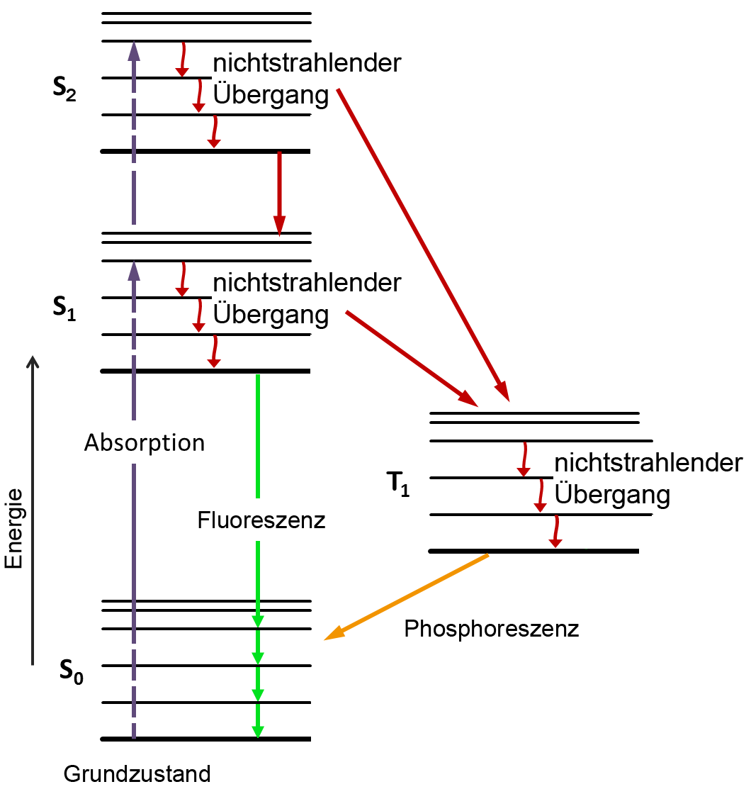 Jablonski-Diagramm speziell für Fluoreszenz, mit S2- und T1-Zustand.